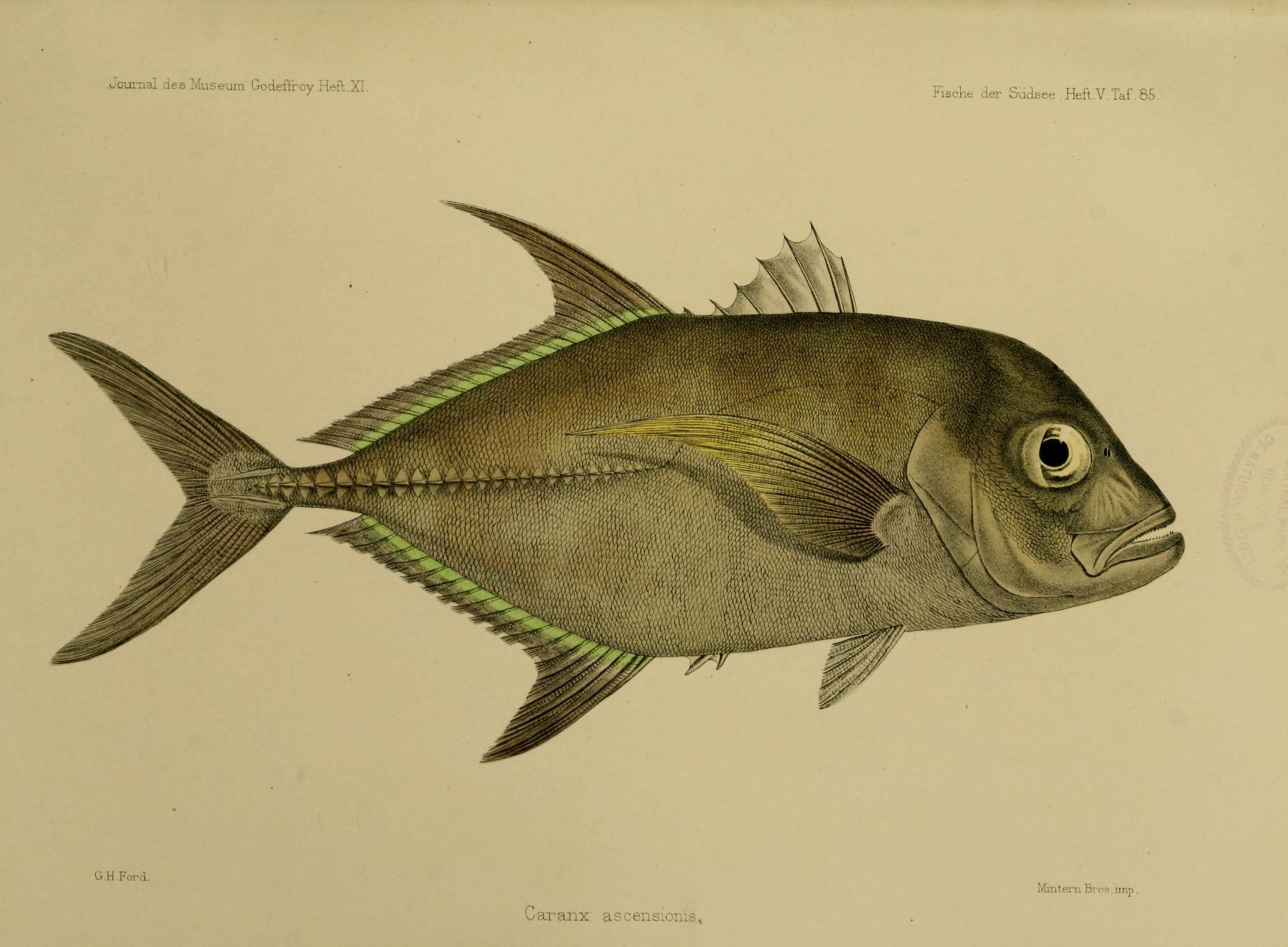 Caranx lugubris